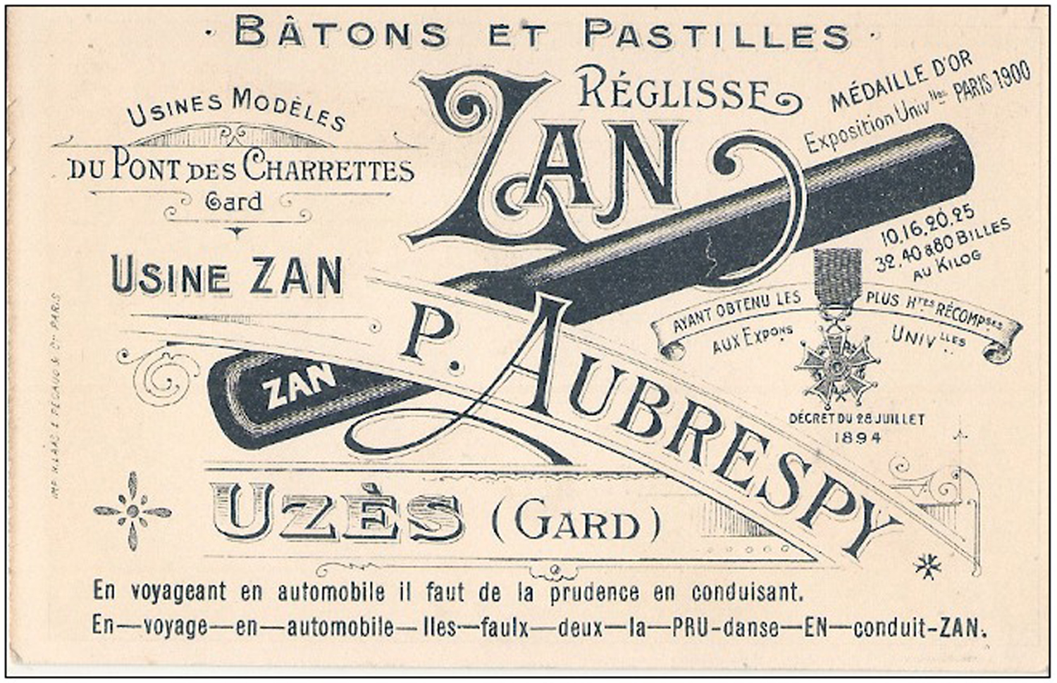 Zan réglisse Aubrespy